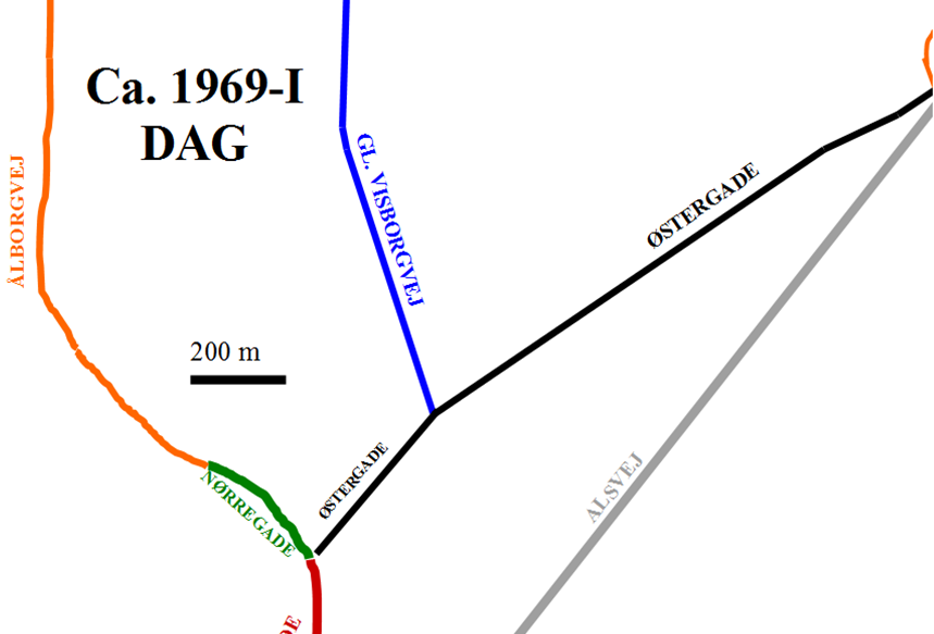 Dette er et billede af Østergades historie i Hadsund